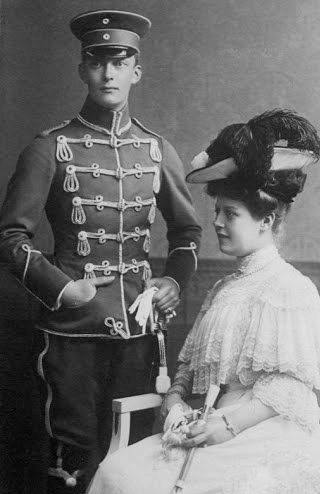 Duke Karl Borwin of Mecklenburg Strelitz and his sister Duchess Marie, Countess Jametel